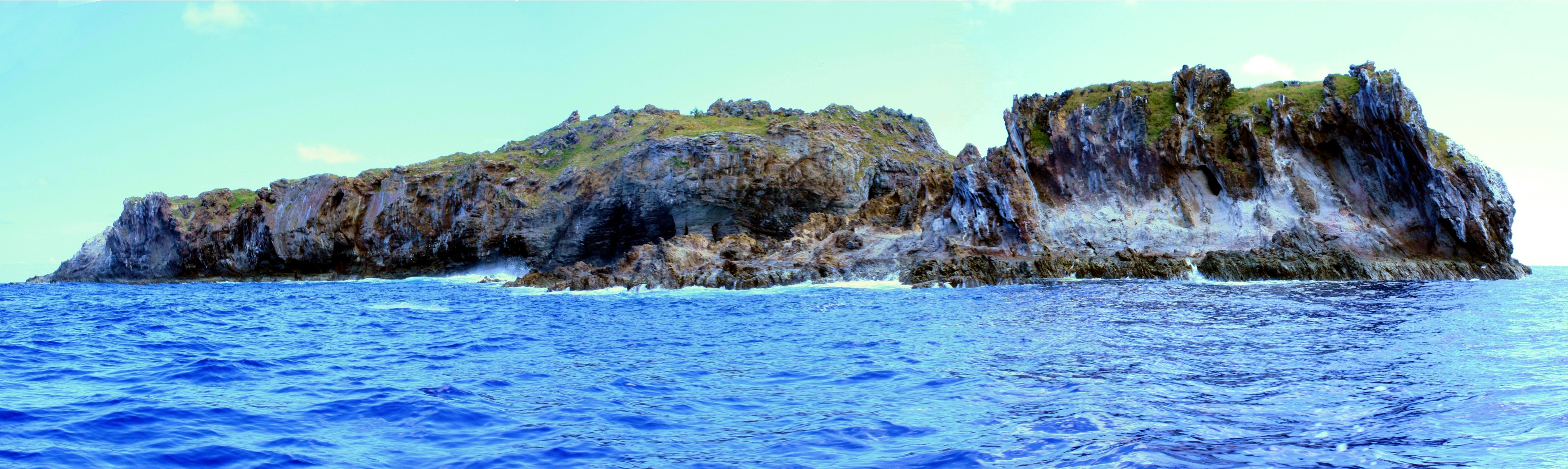 Islotes adyacentes a Isla de Pascua This is a photo of a national monument in Chile: 803